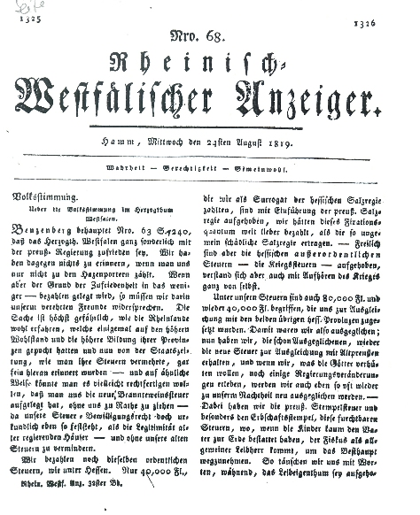 Beitrag von Johann Friedrich Joseph Sommer im Rheinisch-Westfälischen Anzeiger 68/1819